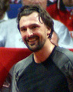 Goran Ivanišević, Madrid Masters Senior 2007